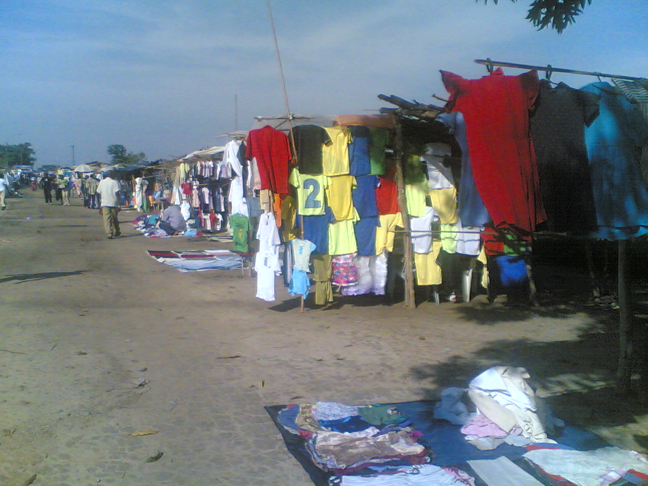 Bandundu, DRC - clothing market